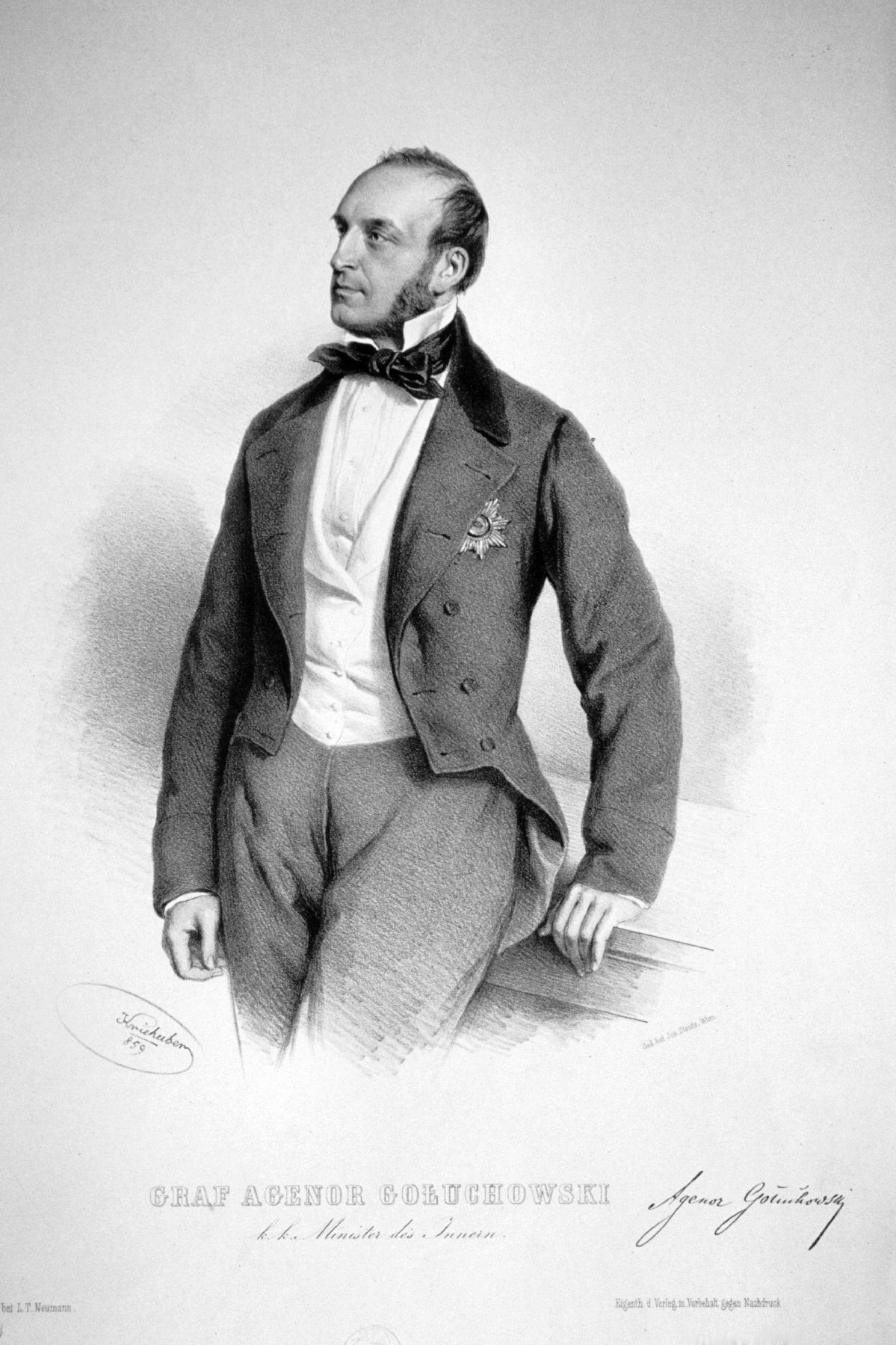 Agenor Graf Goluchowski der Ältere (1812-1875), Statthalter von Galizien, Innenmunister. Lithographie von Josef Kriehuber, 1859